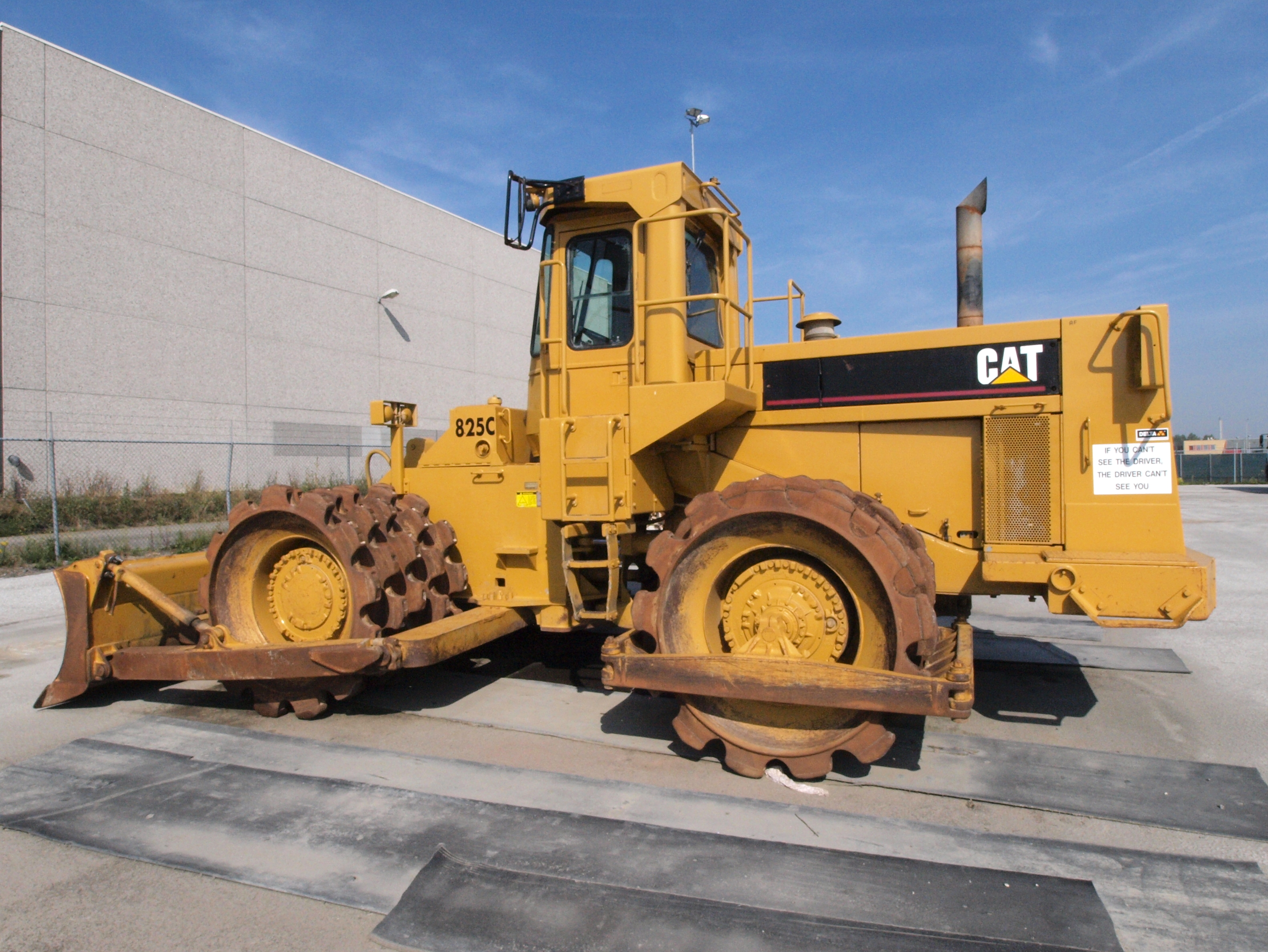 Caterpiller 825C